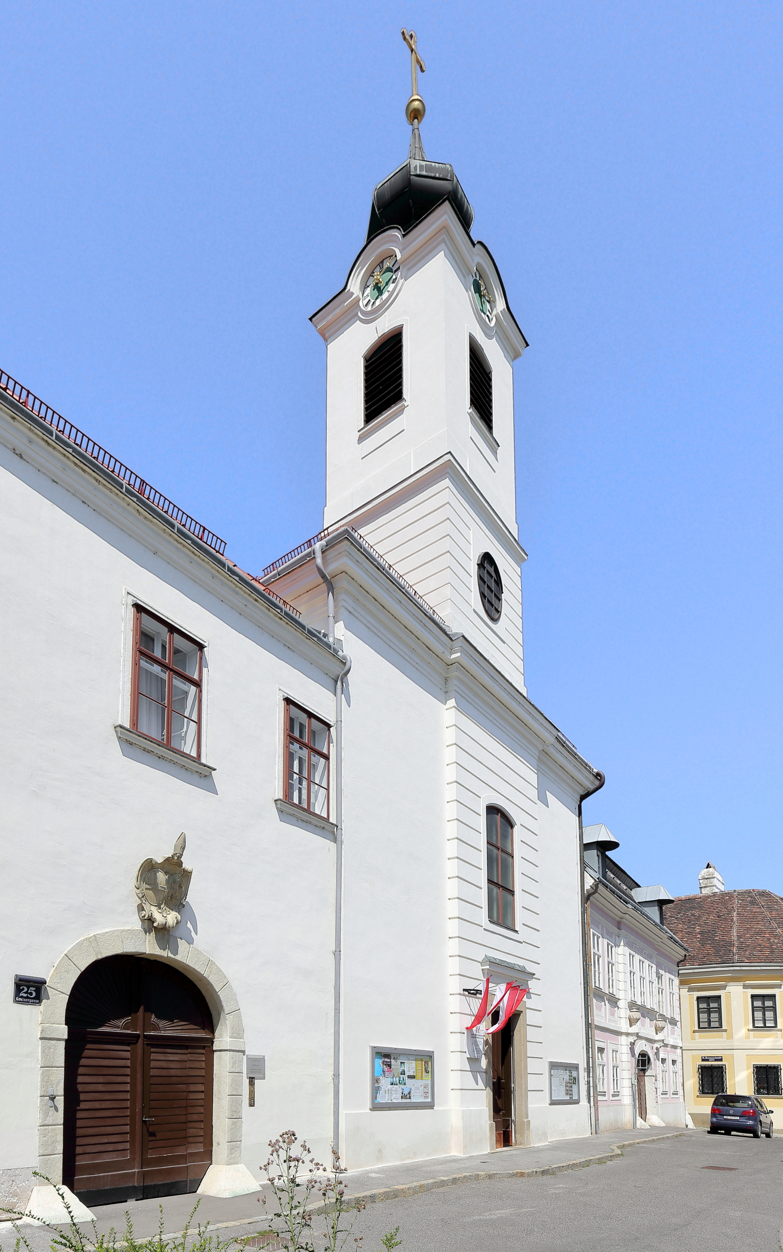 Die Pfarrkirche hl. Apostel Thomas in Nussdorf, ein Bezirksteil des 19. Wiener Gemeindebezirkes Döbling.Die schlichte josephinische Kirche wurde von 1784 bis 1789 nach Plänen von Josef Gerl erbaut, nachdem Nussdorf im Zuge der josephinischen Reformen eine eigenständige Pfarre wurde.